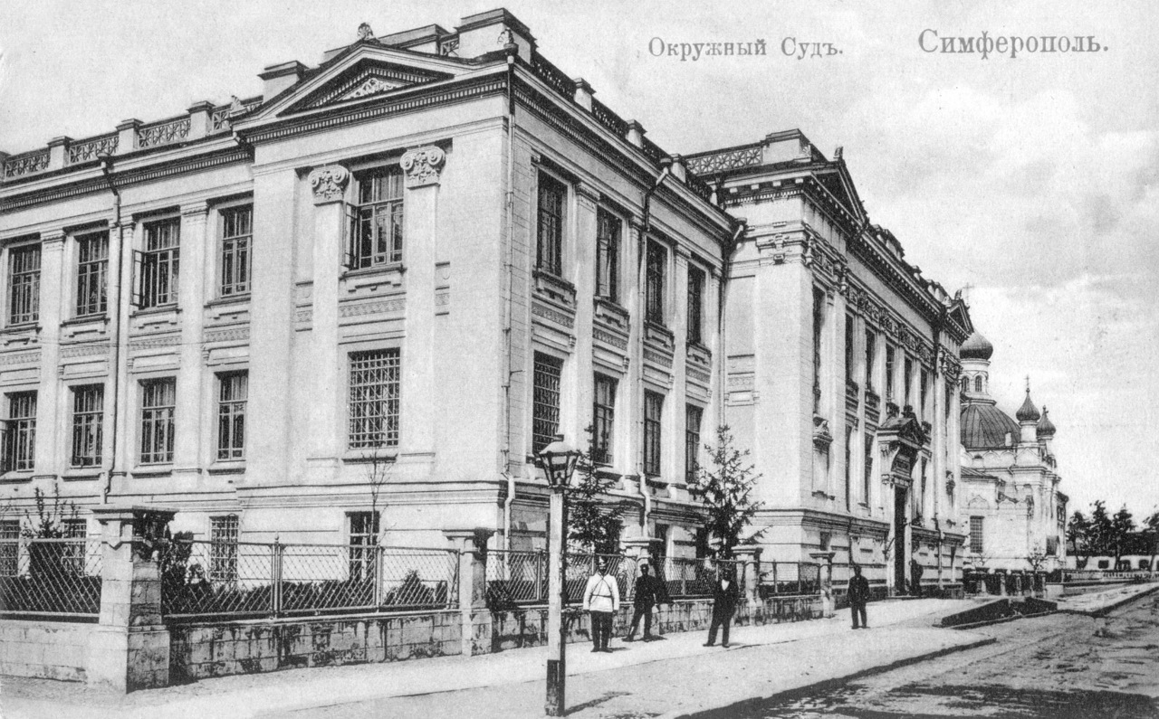 Симферопольский окружной суд